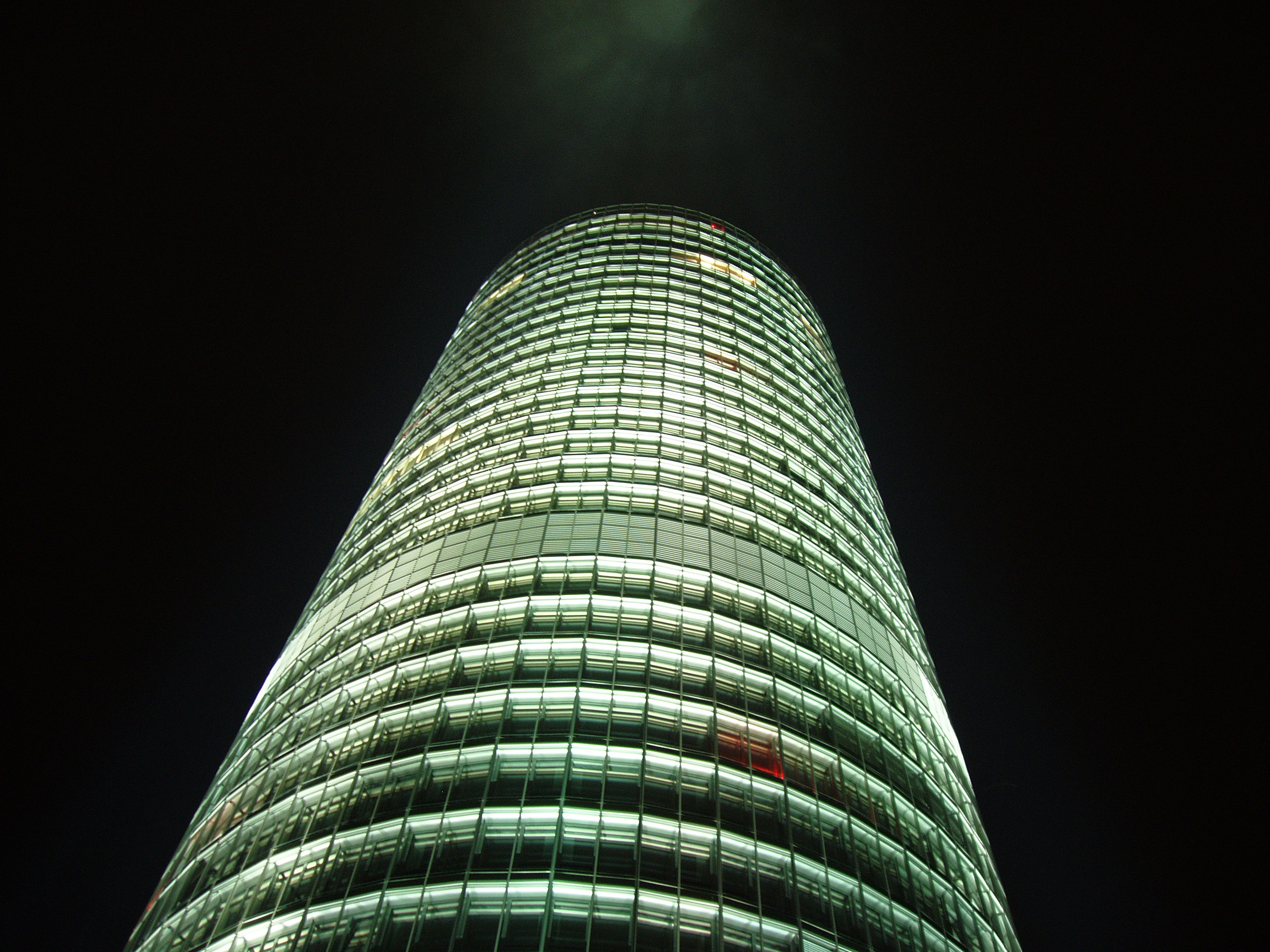 Business Tower, Nuremberg